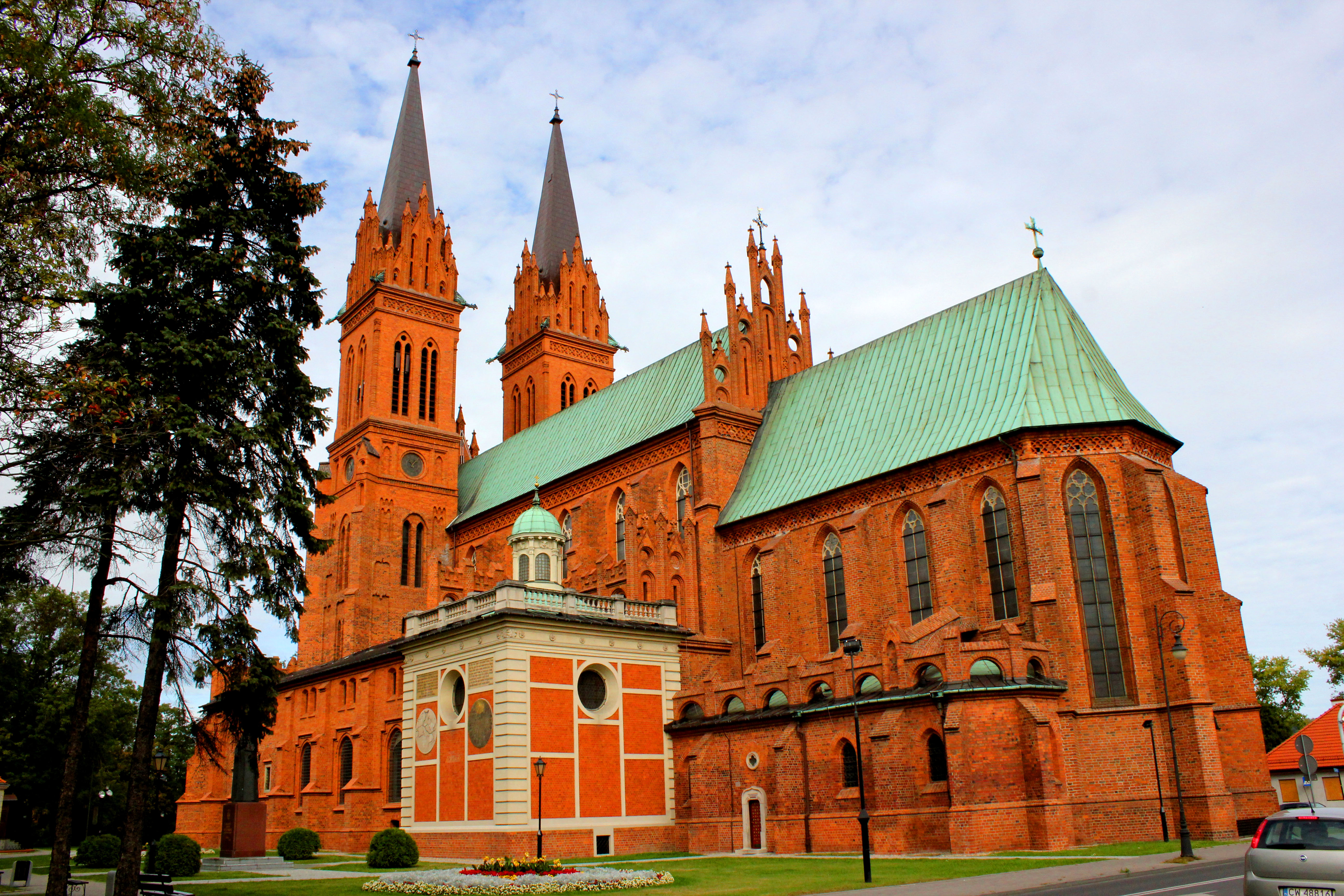 katedra p.w. Wniebowzięcia NMP, XIV/XV, XVI-XVII, 1891 Włocławek, ul. Gdańska 3, miasto Włocławek